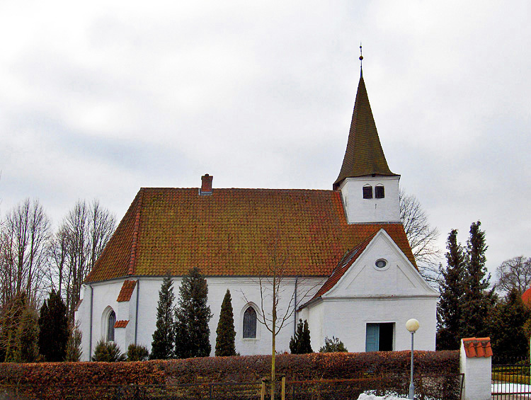 fra nord